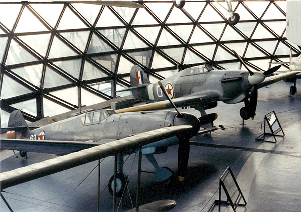 Део сталне поставке Музеја ваздухопловства.